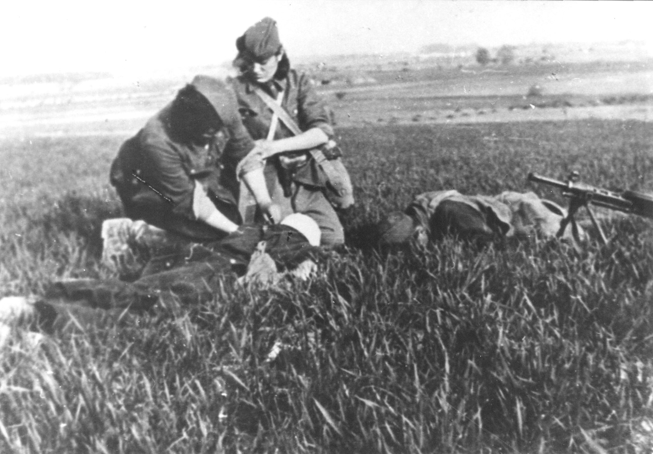 Srpskohrvatski / српскохрватски: Previjanje ranjenika 13. proleterske brigade na Sremskom frontu, april 1945. godine.